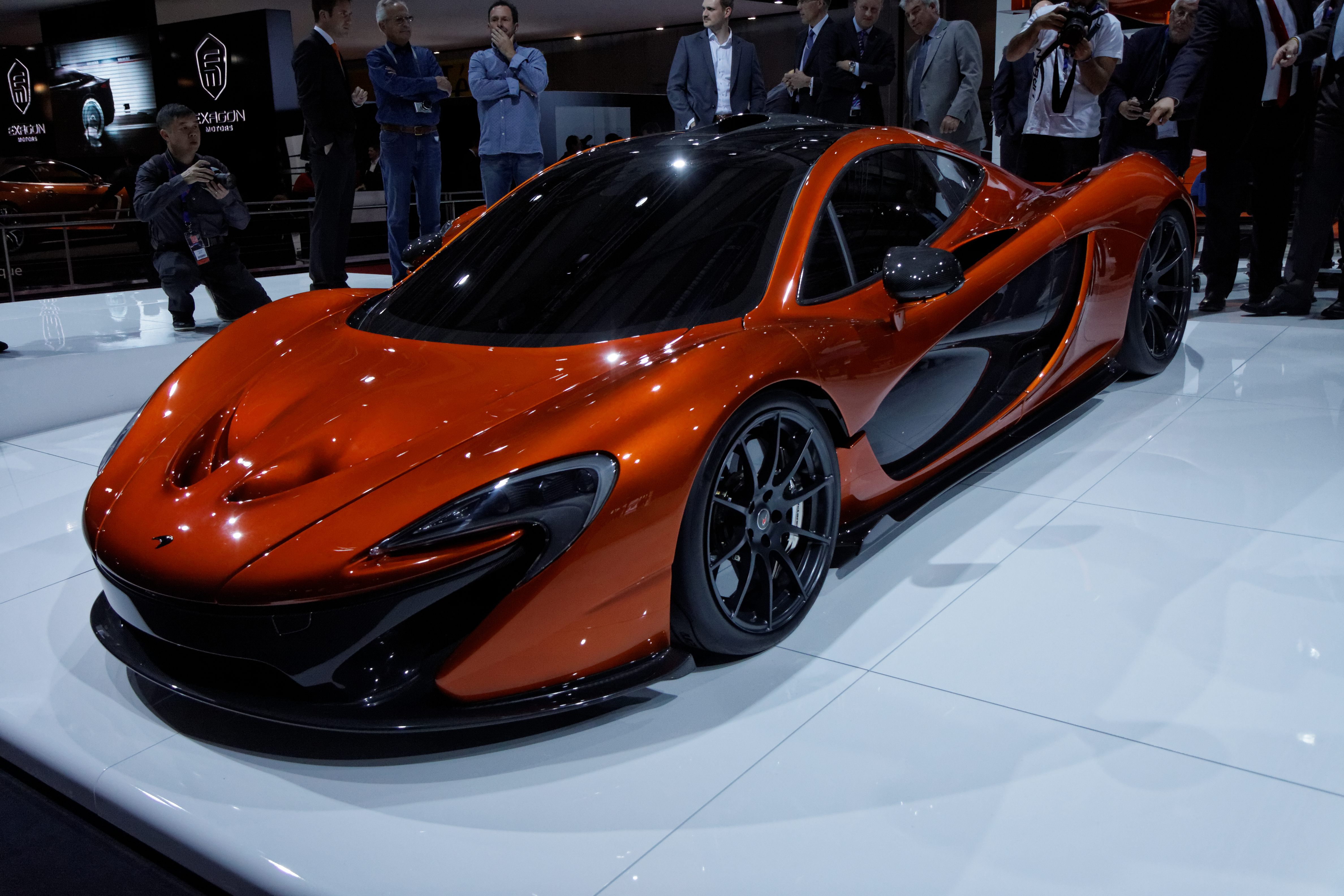 Une McLaren P1 présentée lors du Mondial de l'Automobile de Paris 2012.